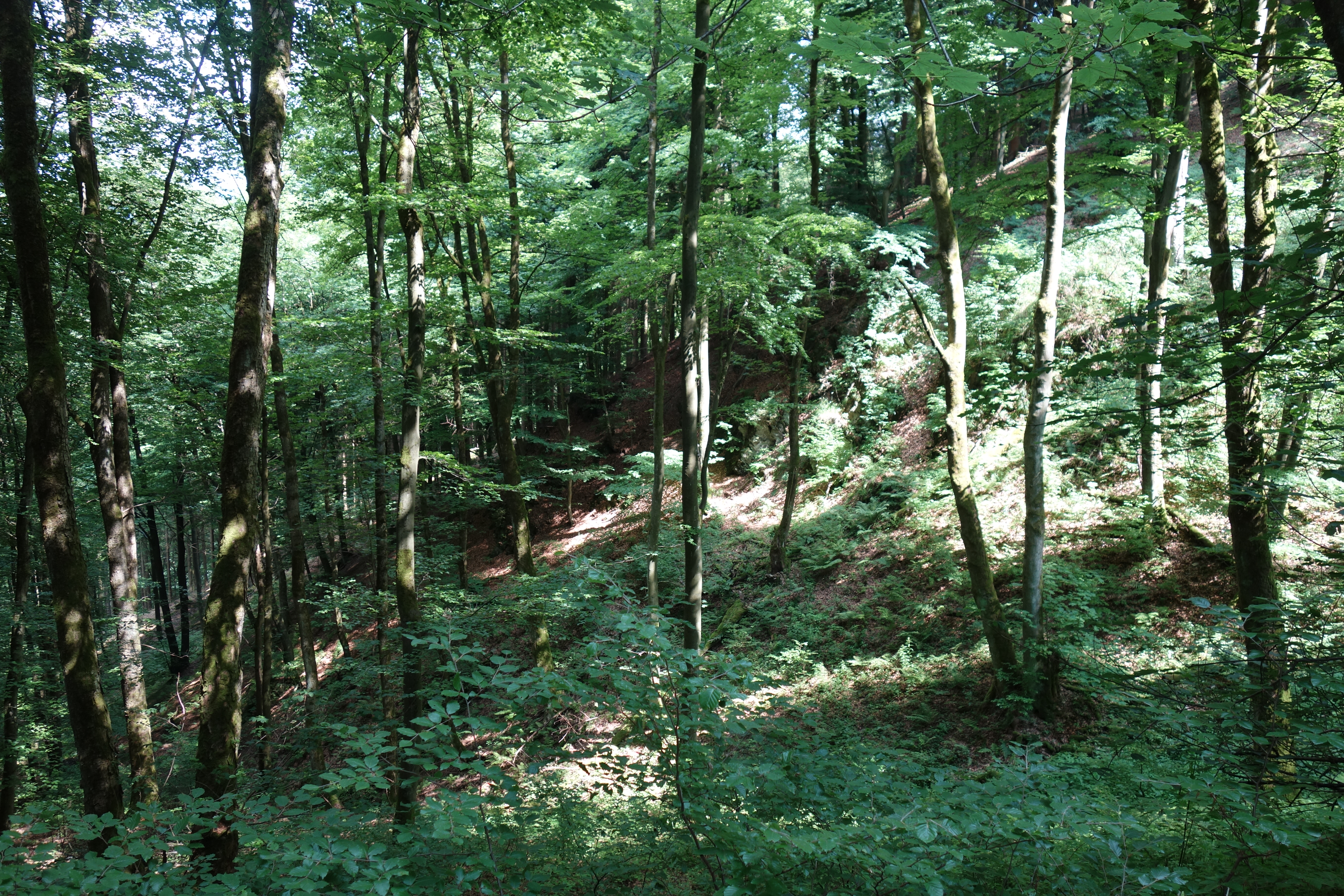 Blick ins Naturschutzgebiet Steinmarkskopf-Hardenberg (Südfläche).